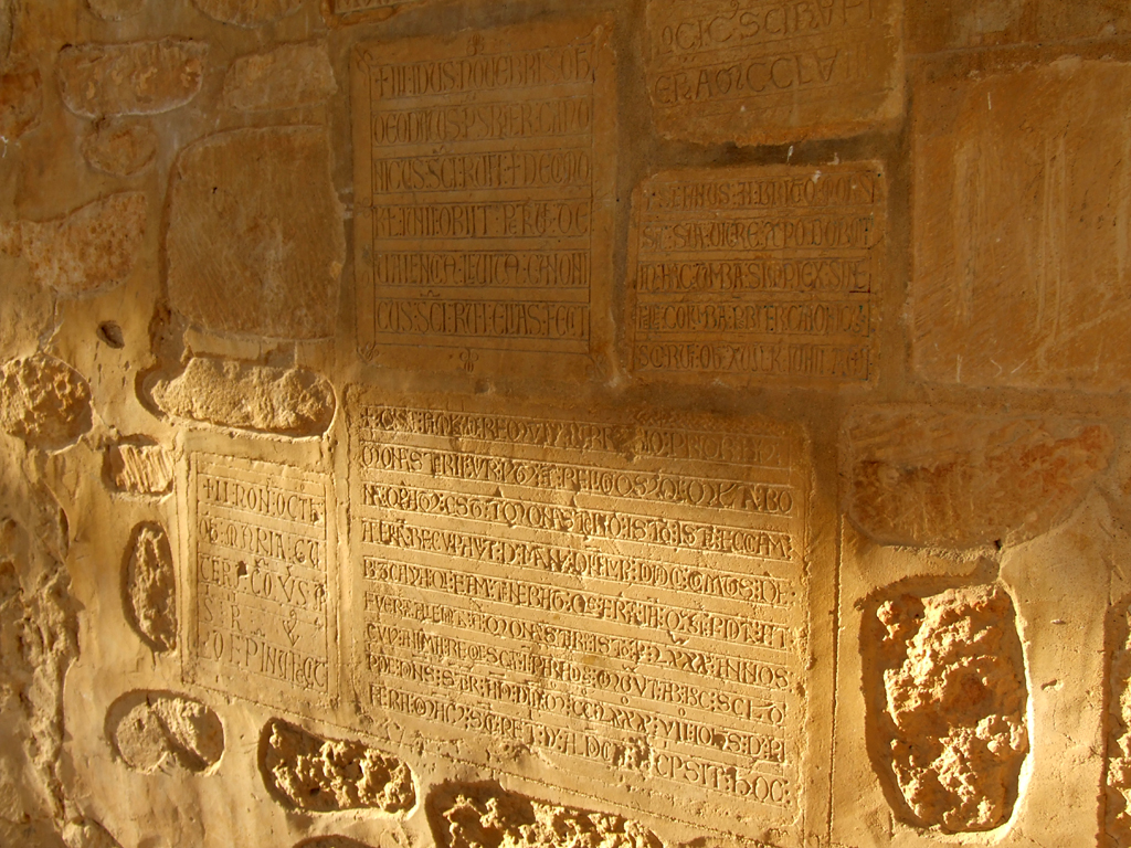 San Miguel de Escalada: aras visigóticas.